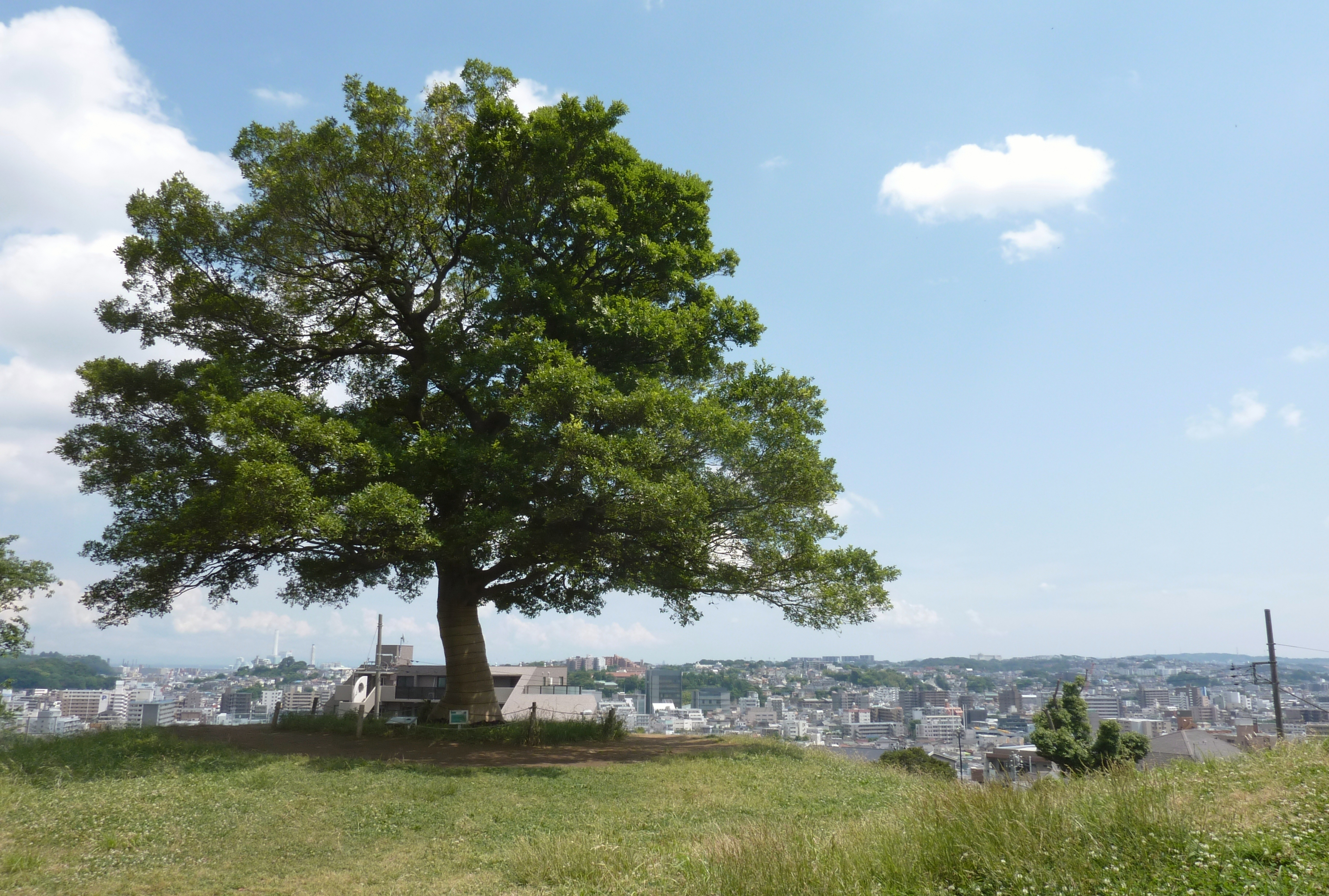 清水ケ丘公園の見晴らし台に立つエノキ（神奈川県横浜市南区）